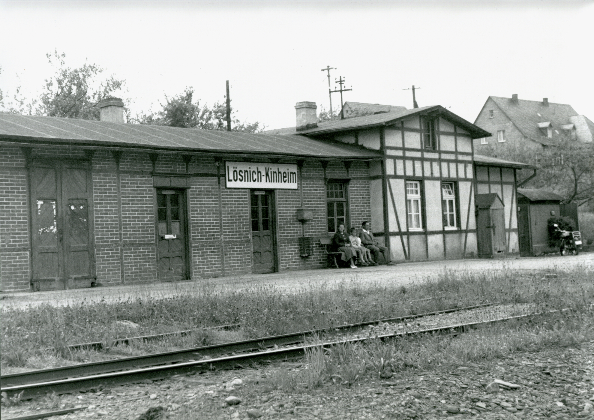 Bahnhofsgebäude der Moselbahn in Lösnich 1963. Mittlerweile abgerissen.